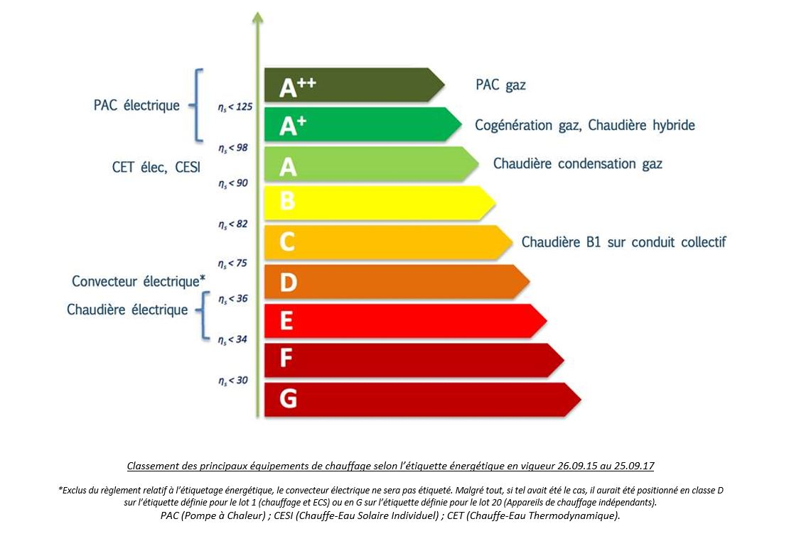 Comparaison des principaux équipements de chauffage en fonction de leur étiquette énergétique